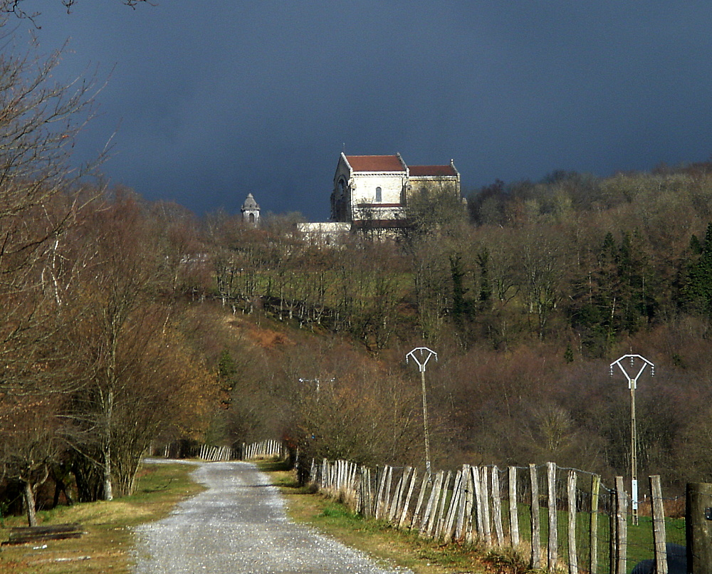 Urkiolako santutegiaren ikuspegia